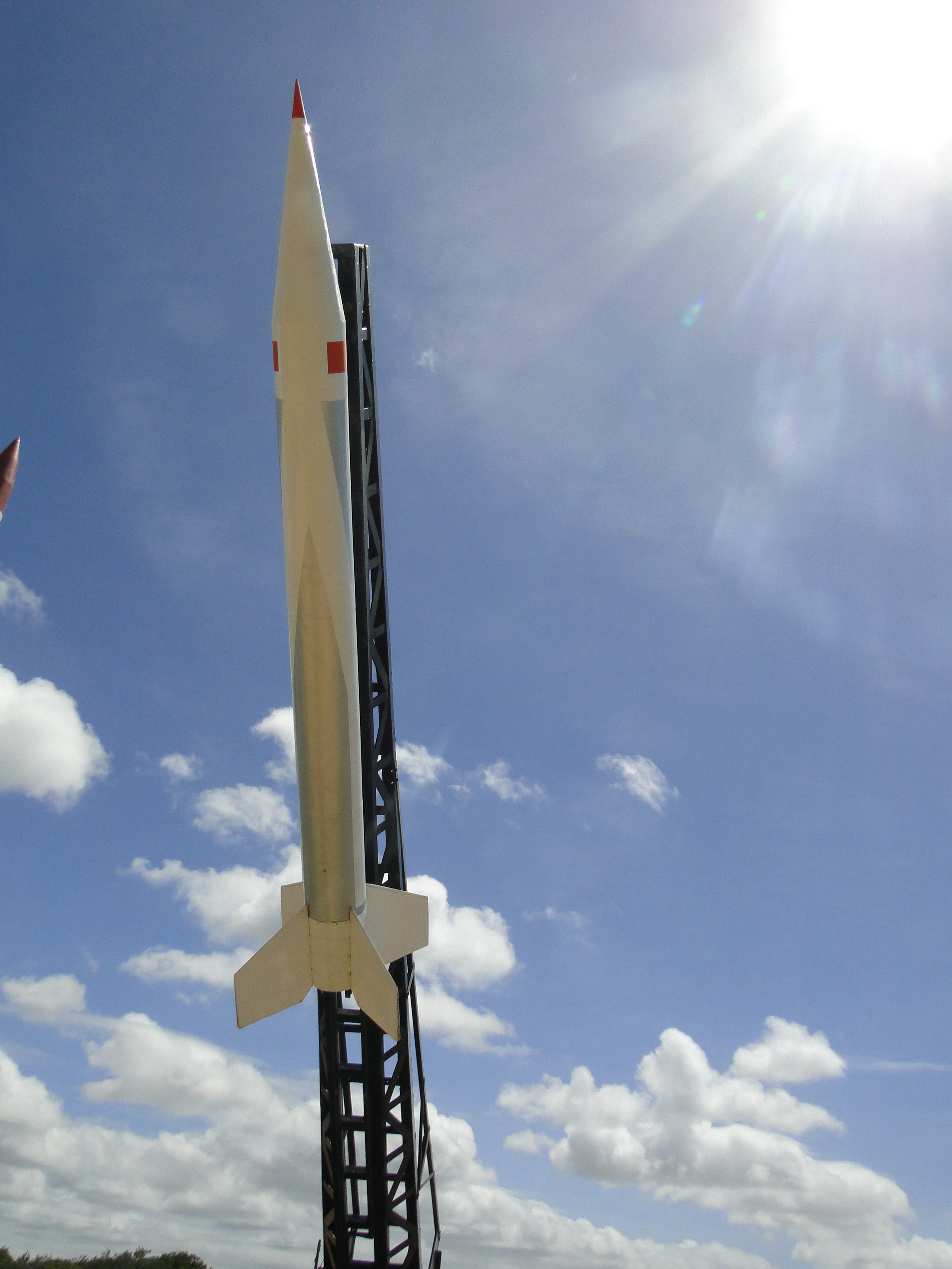 Modelo do foguete Sonda II em exposição.